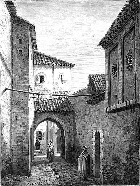 dar oum noun the birth place of Ahmed bey (algerian leader in 19th century) dar oum noun la maison ou est né le Bey de Constantine Hadj Ahmed Bey (un leader algérien 19e siècle)